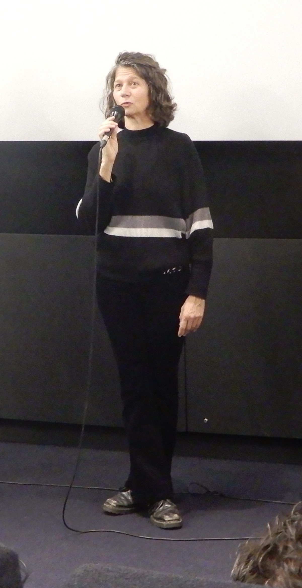 Marie-Hélène Dozo est une monteuse belge.Photo prise en novembre 2019 à la Cinématek, un cinéma d'art et d'essai, en compagnie des frères Dardenne avec lesquels elle a beaucoup travaillé.